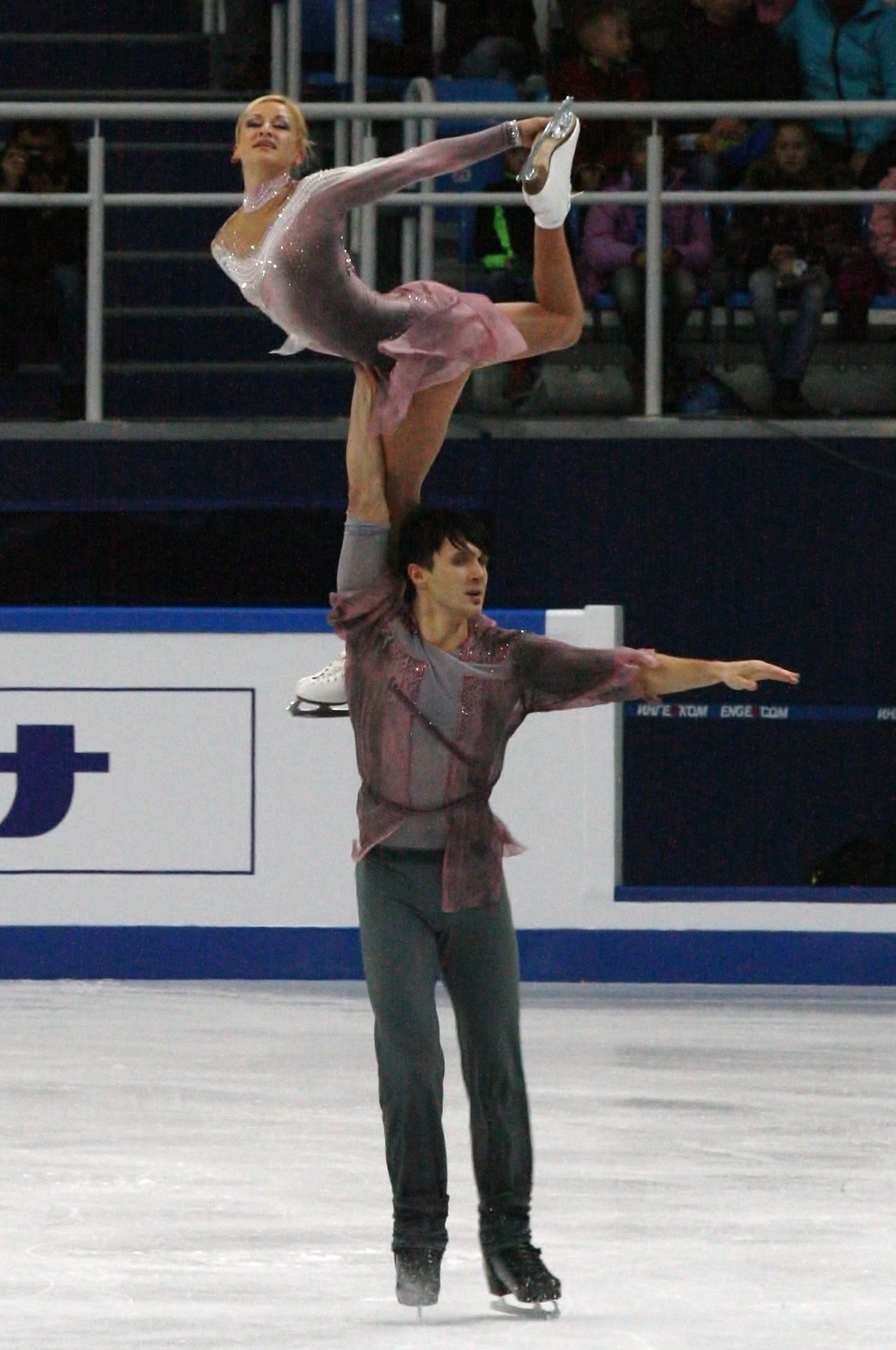 Татьяна Волосожар и Максим Траньков (Россия) на финале Гран-при 2012-2013. Произвольная программа.